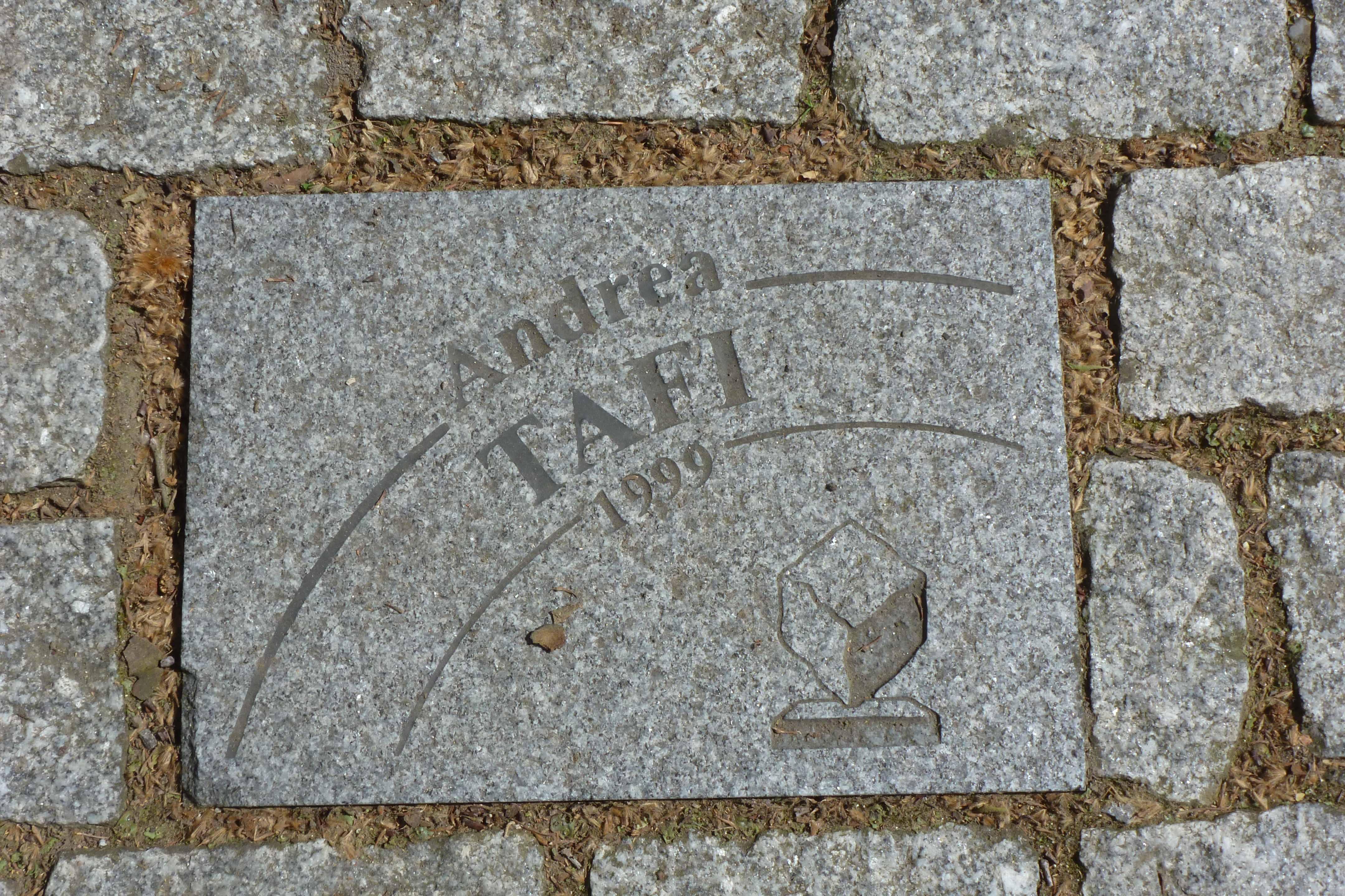 Pflasterstein für Andrea Tafi auf der Allée Charles Crupelandt in Roubaix